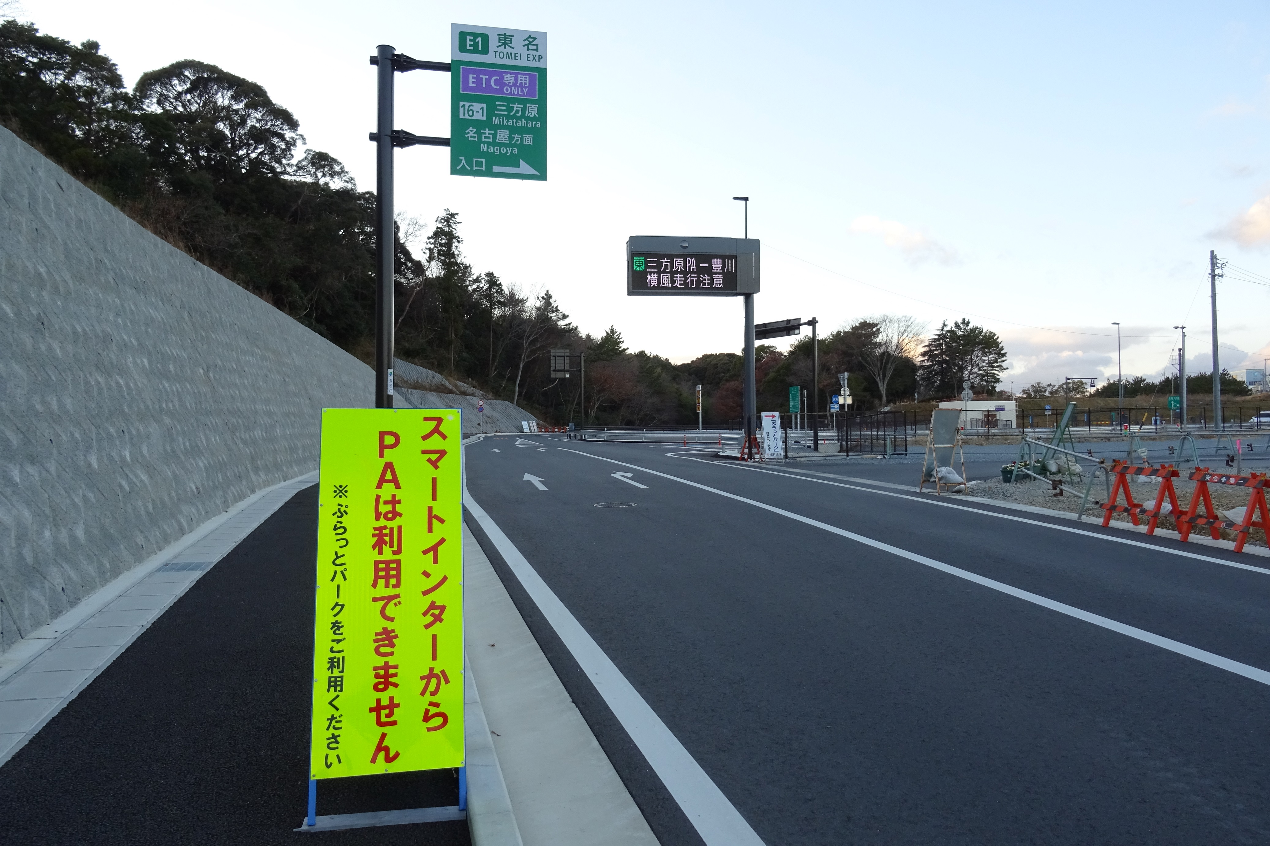 三方原下り